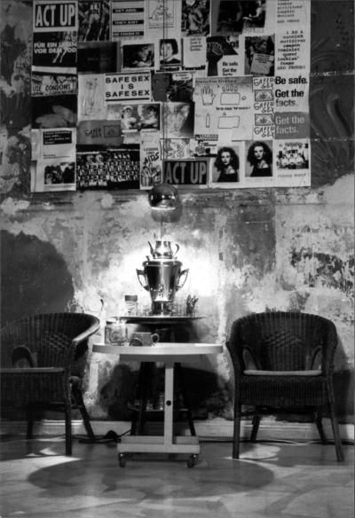 der Teeplatz bei bildwechsel